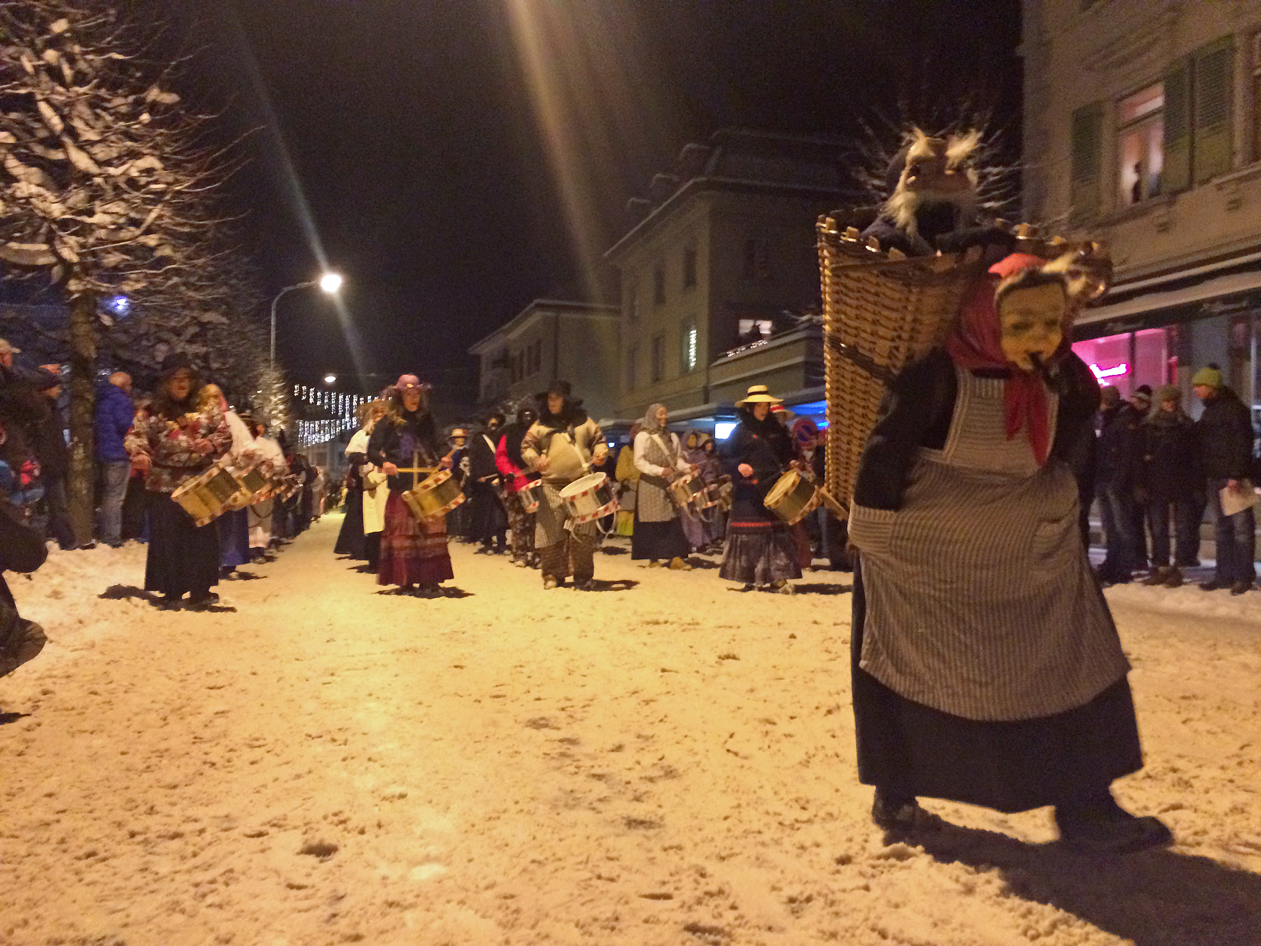 Ubersitz in Meiringen (30. Dezember 2014) – Trychlerumzug